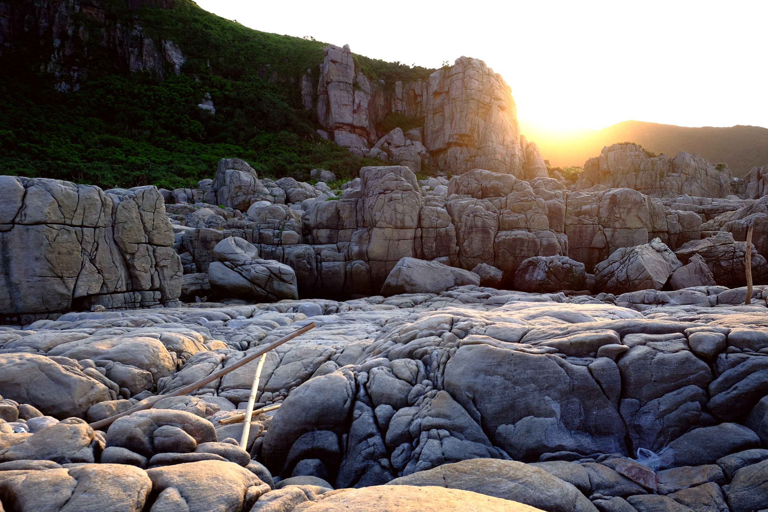 龍洞 Longdong(Taiwan)